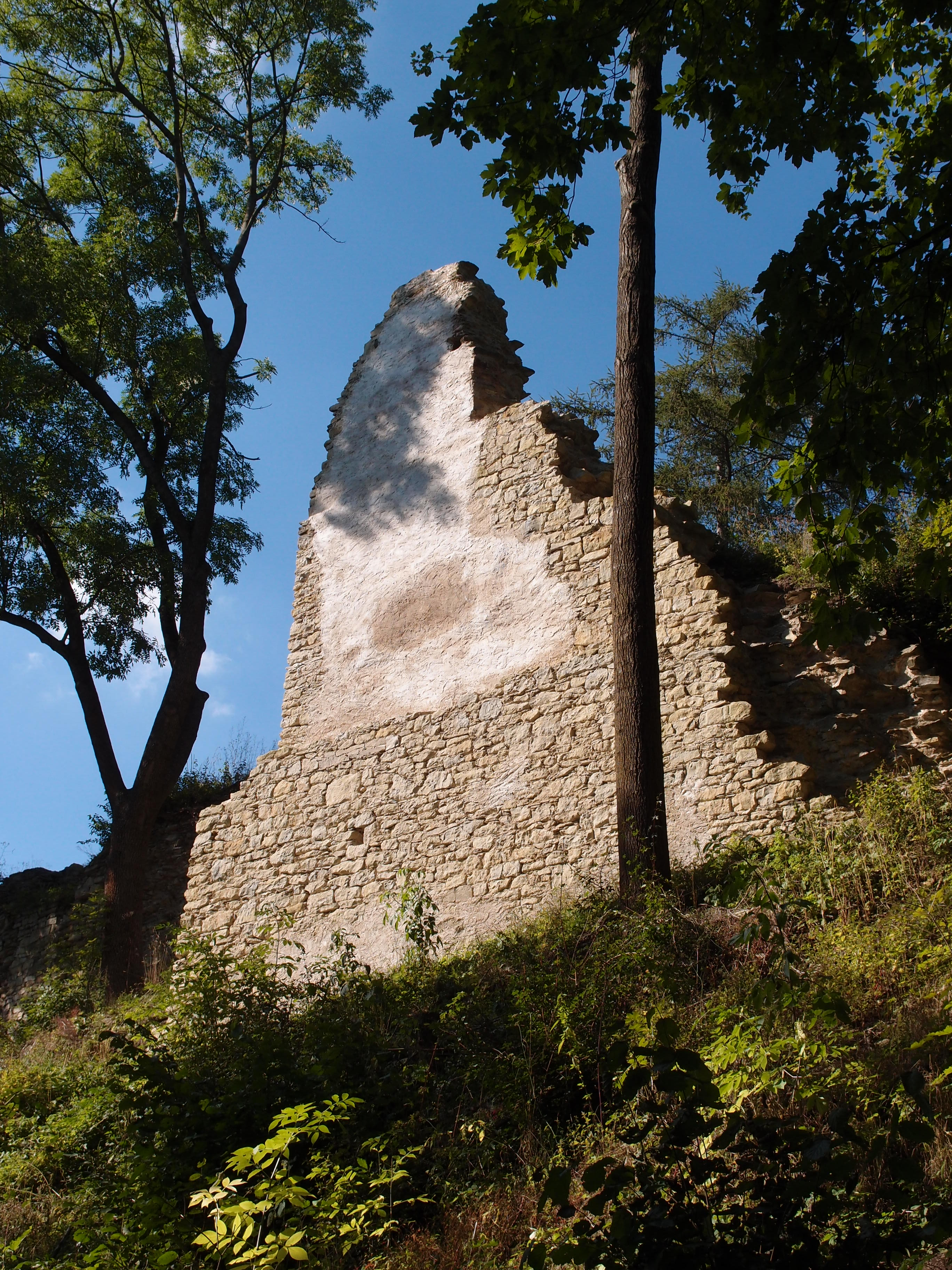 Hrad Brandýs nad Orlicí - stav srpen 2014